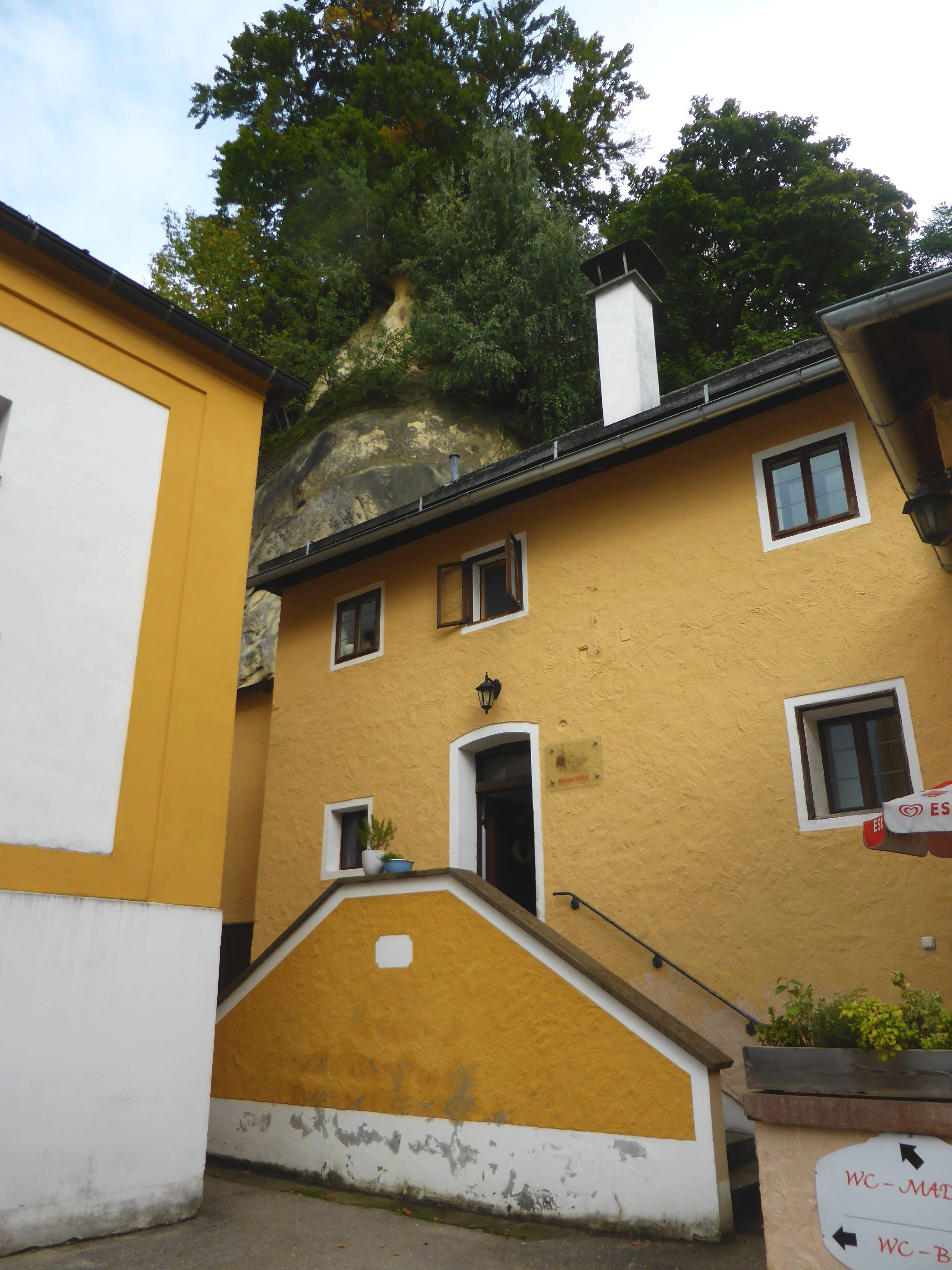 Wirtshaus Schlössl in St. Pankraz am Haunsberg, Gemeinde Nußdorf am Haunsberg